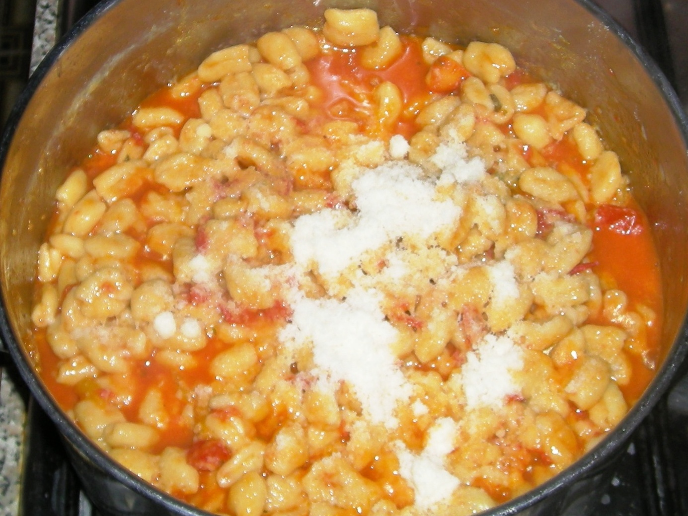 Macarrones de punzu or Ciusòni, traditional sardinian food.